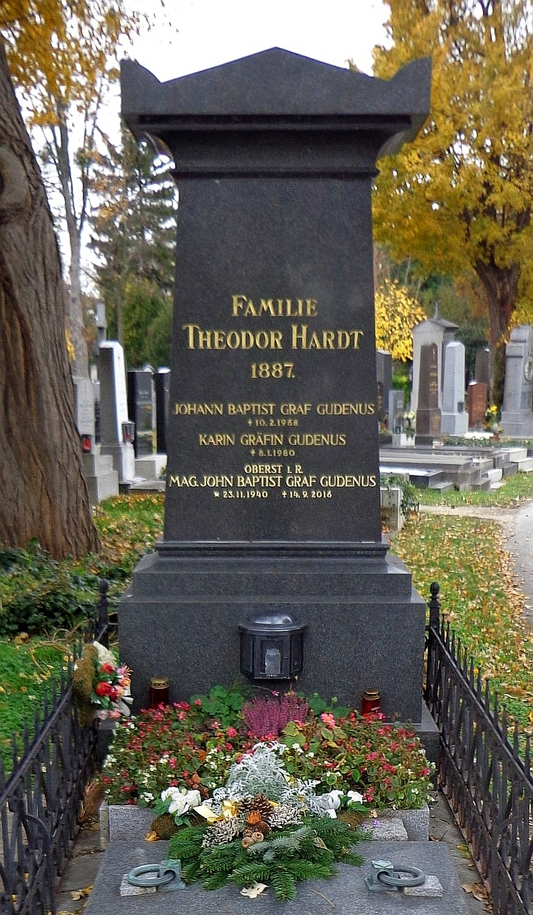 Wiener Zentralfriedhof, Ruhestätte von John Gudenus (im mittlerweile von der gräflichen Familie Gudenus genutzen Grab der Familie Theodor Hardt) links neben den Alten Arkaden. Sein ebenfalls in diesem Grab bestatteter Vater Johann Baptist Gudenus (1908–1968) war ein österreichischer Olympiateilnehmer.